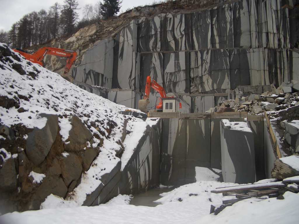 A diorite mine , Vico Canavese, Torino, Italy